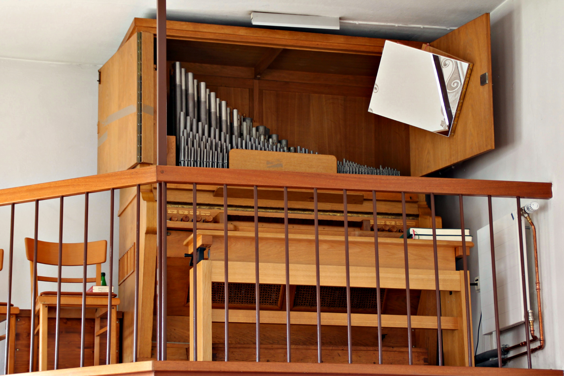 Orgel der Evangelischen Kirche Lindenstruth, Gemeinde Reiskirchen, Landkreis Gießen, Hessen, Deutschland